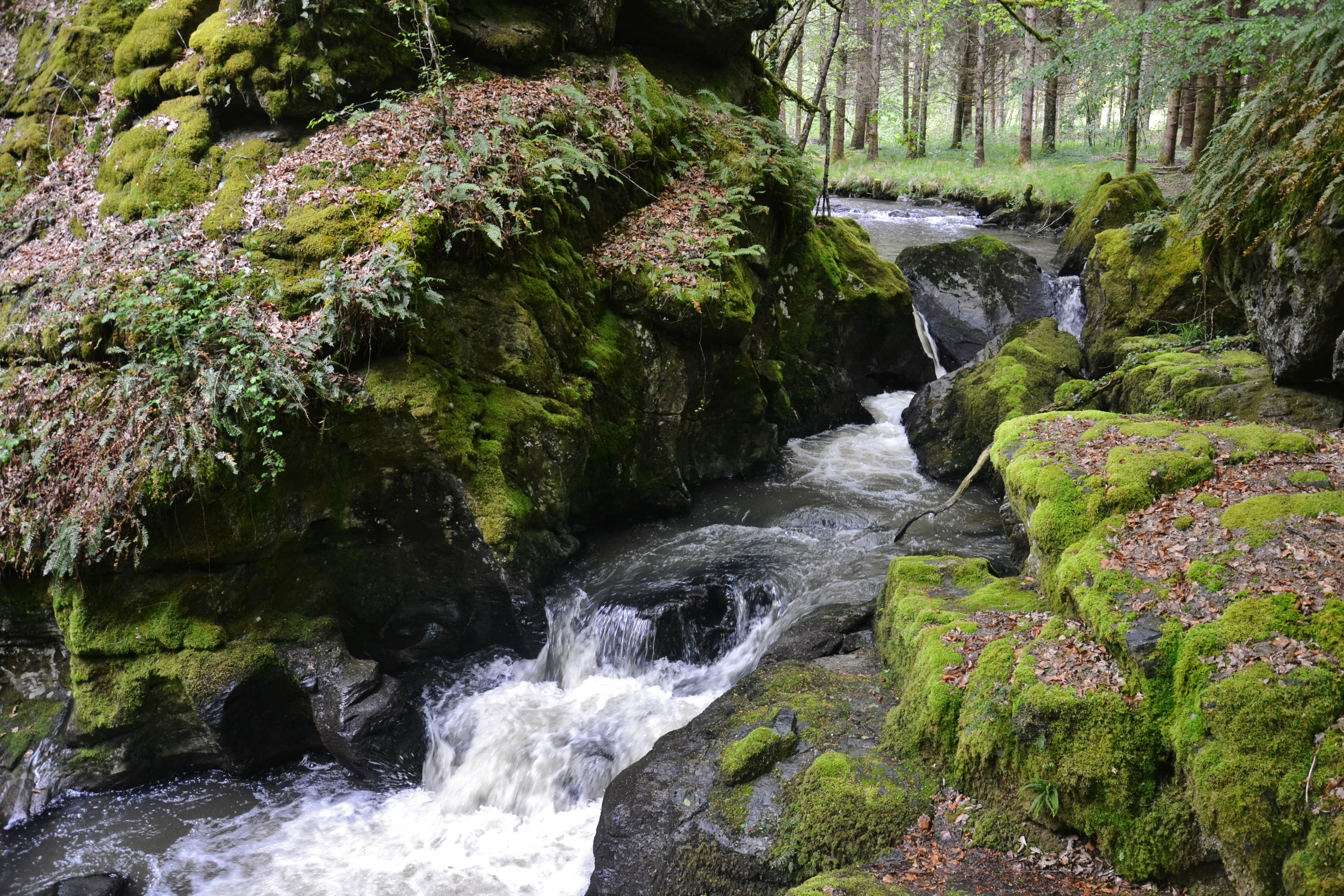 Le Rujoux à Pierrefitte, sur la route de Saint-Jal (Corrèze, France)